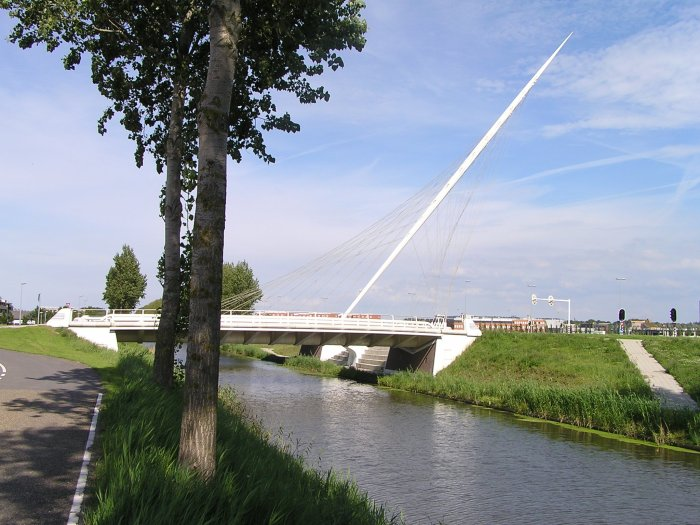 Description Brug ontworpen door Santiago Calatrava, genaamd Luit. Foto augustus 2005.Source Own workAuthor RonaldPermission(Reusing this file) eigen werk Brug ontworpen door Santiago Calatrava, genaamd Luit. Foto augustus 2005.